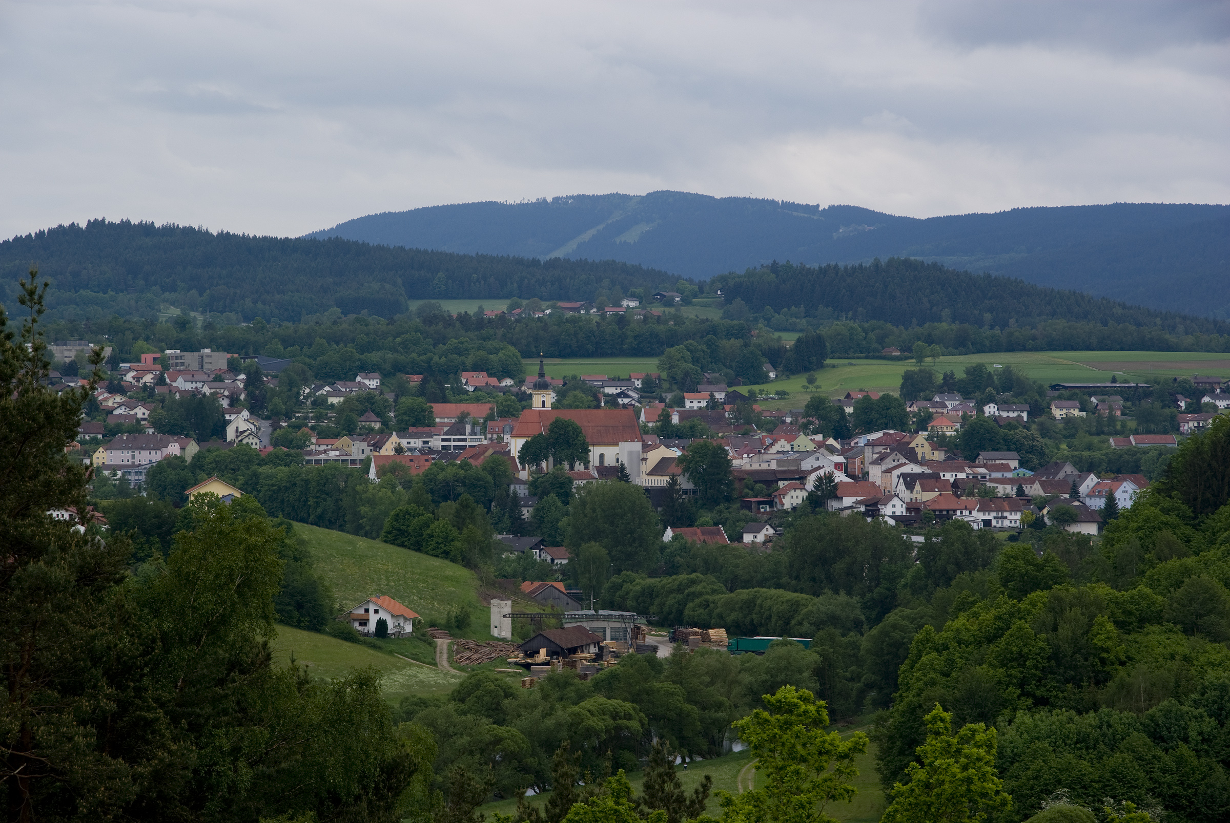 Blick ins Viechtacher Zentrum mit Kirche.